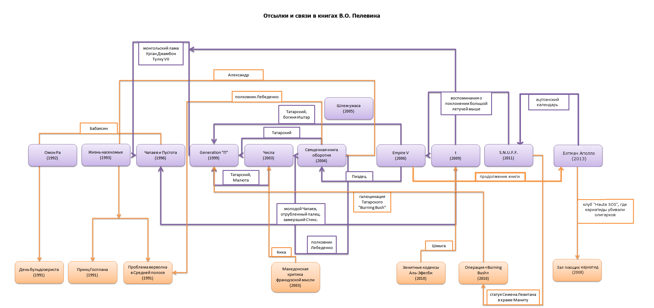 Схема отсылок в книгах В.О.Пелевина.